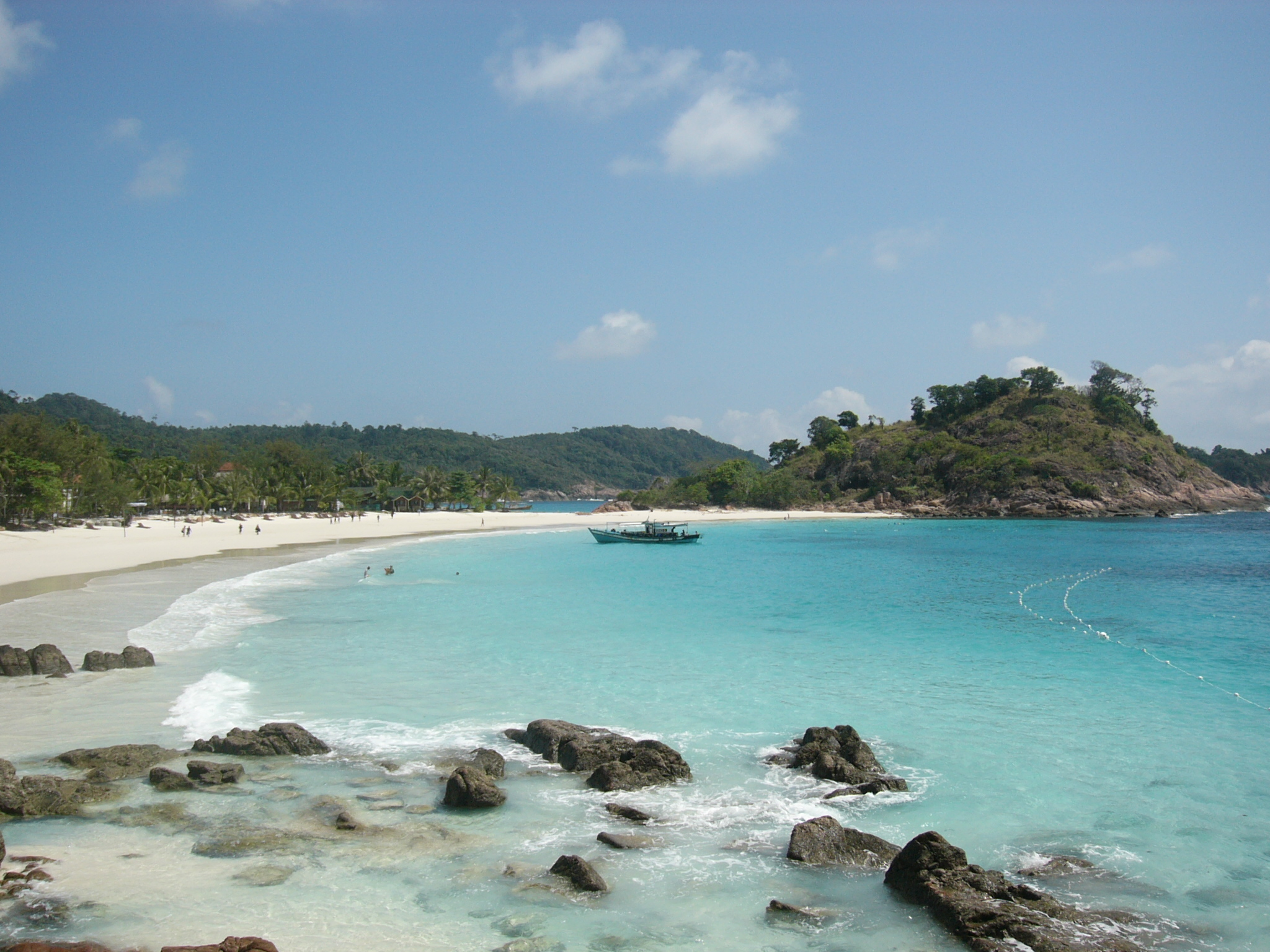 Beach Pasir Panjang on Pulau Redang